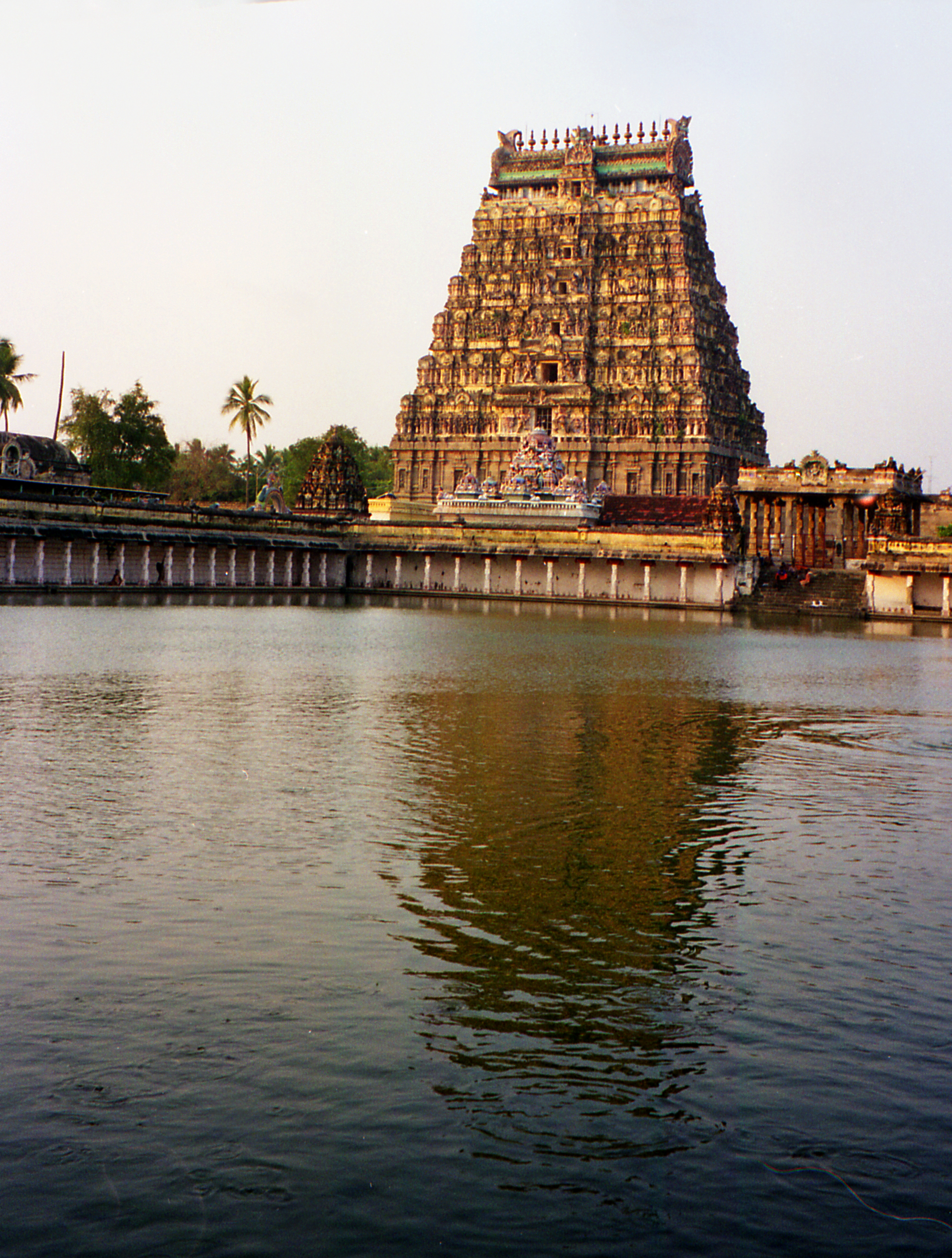 Chidambaram Temple in Tamil Nadu, India